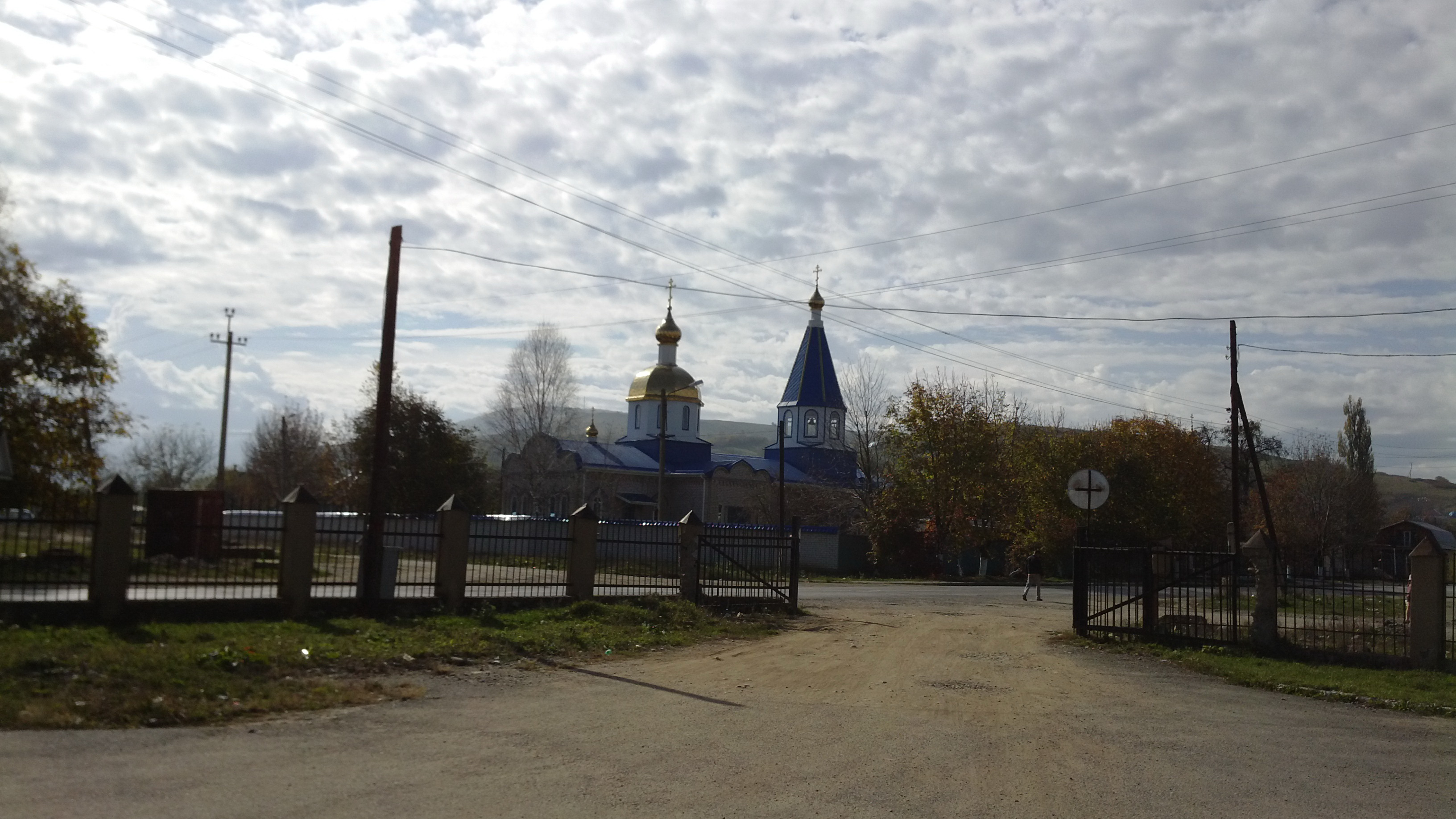 Pregradnaya, Karachaevo-Cherkesskaya Republits, Russia